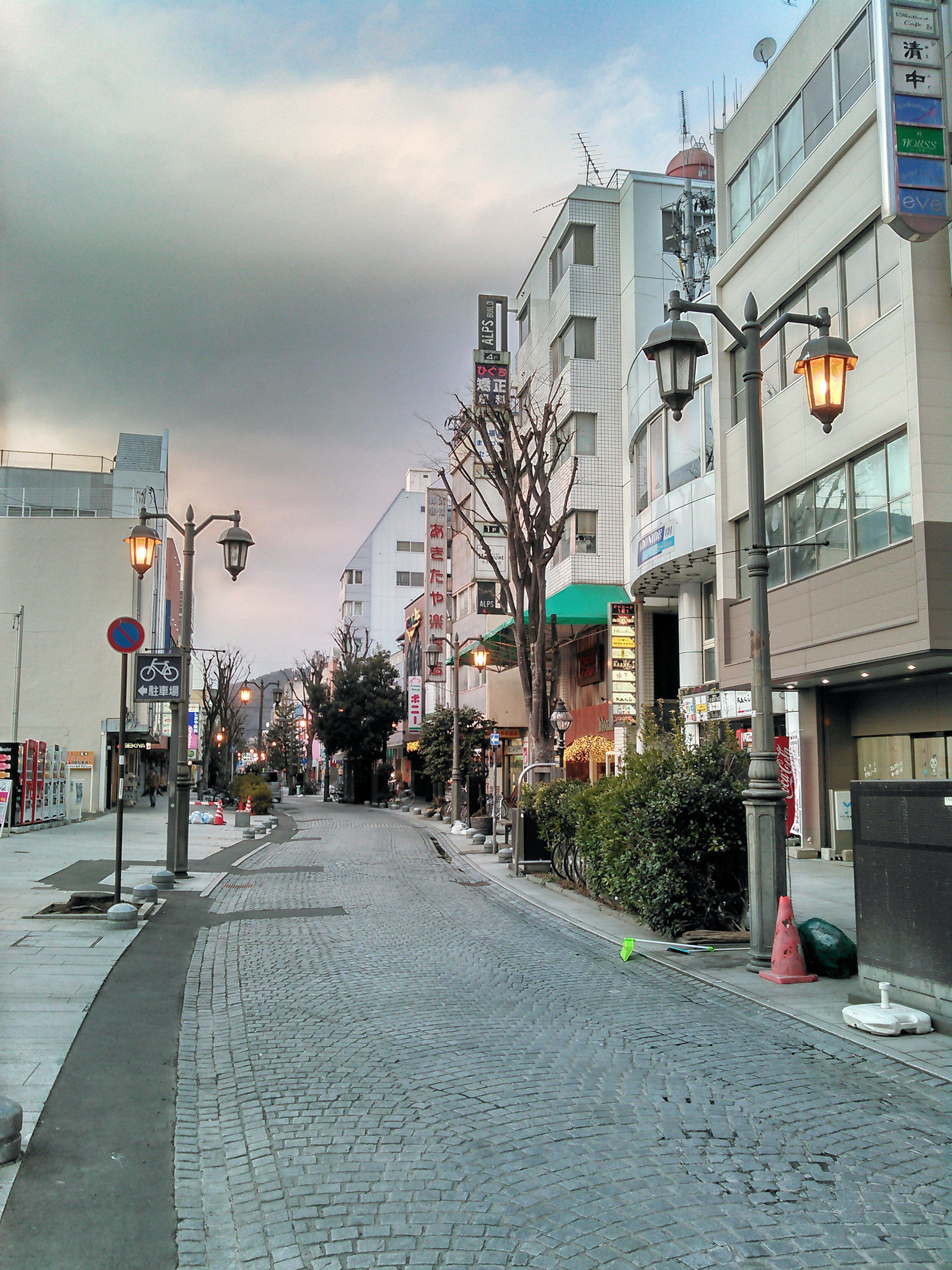 福島市のパセオ470